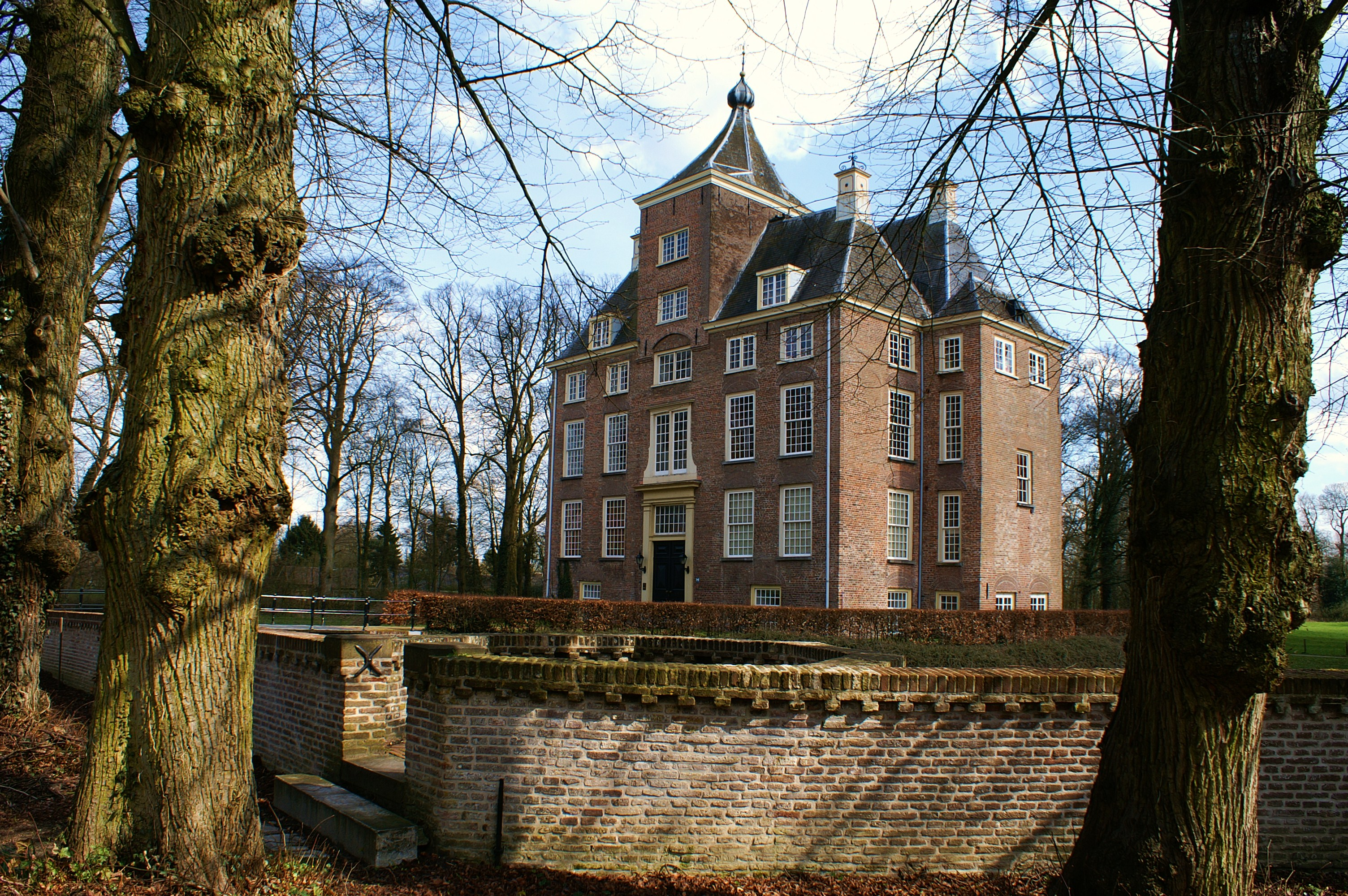 Kasteel Soelen te Zoelen.